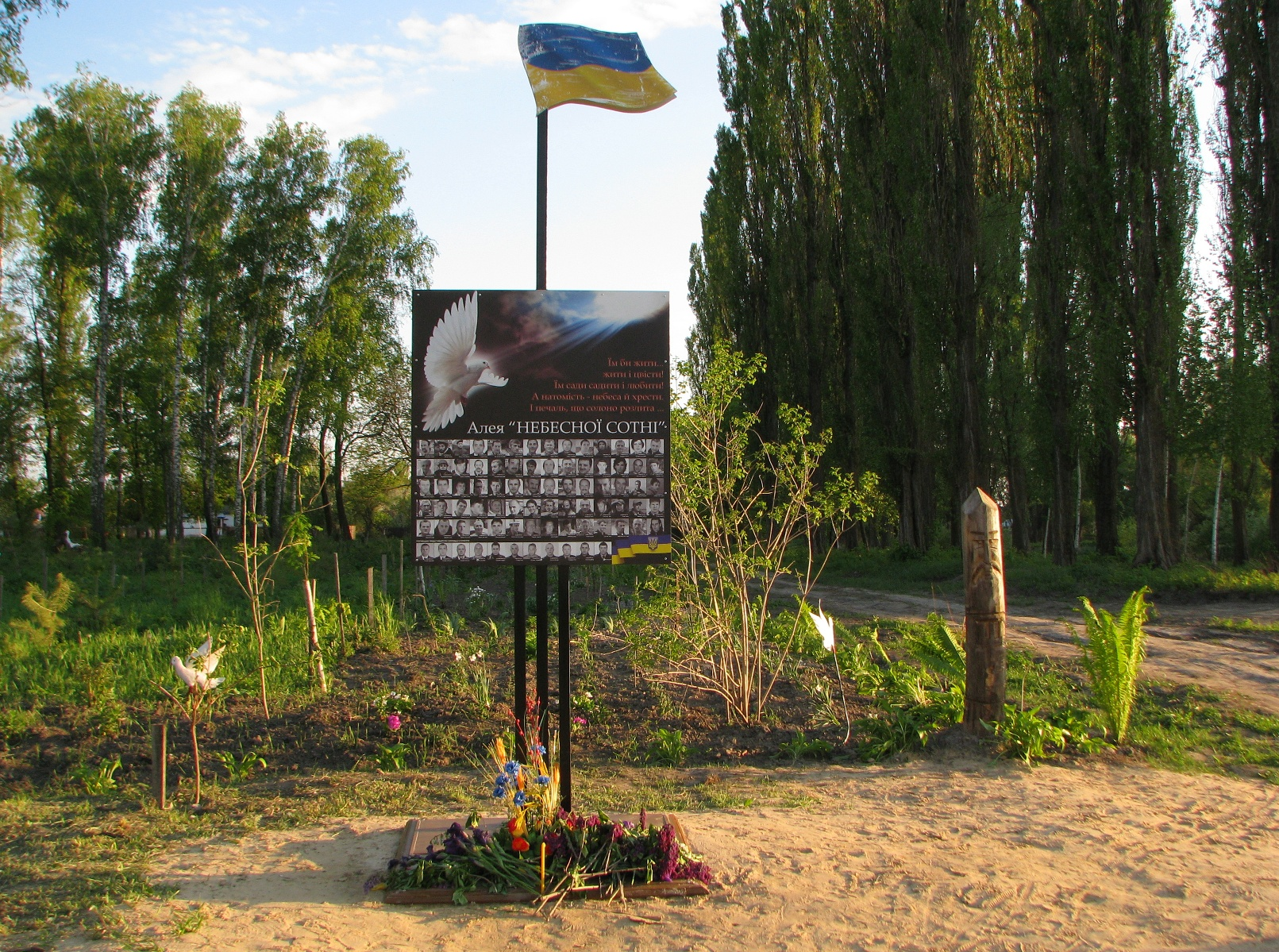 Алея "Небесної Сотні". Село Марківці, Бобровицький район, Чернігівська область.